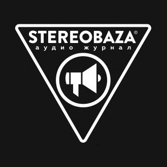 Логотип першого аудіо журналу STEREOBAZA